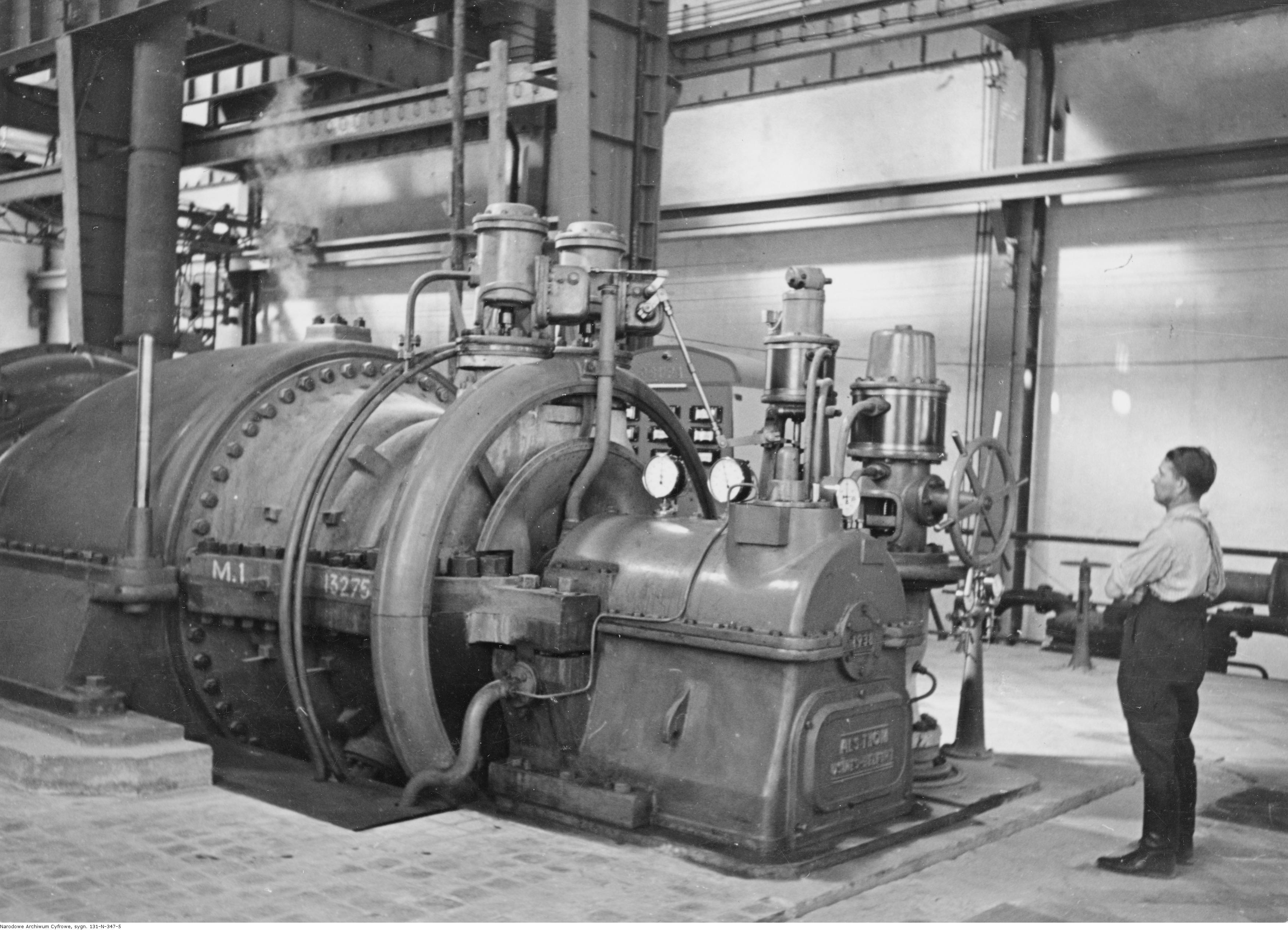 Elektrownia.